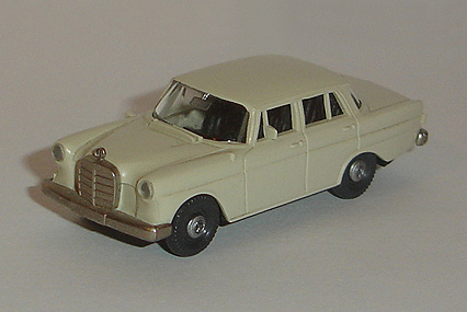 Automodell des Herstellers Brekina, darstellend einen Mercedes 190 PKW (W 110)